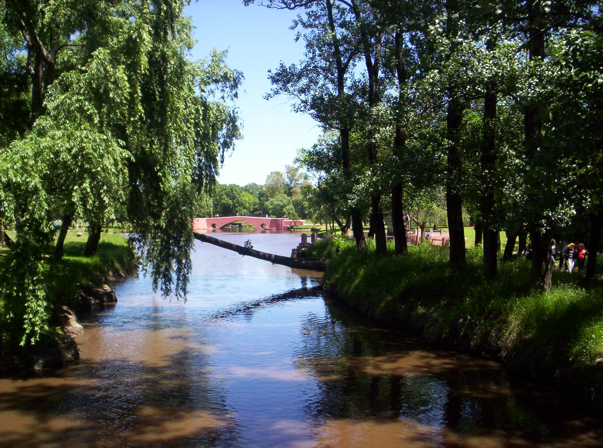 Puente Viejo, San Antonio de Areco